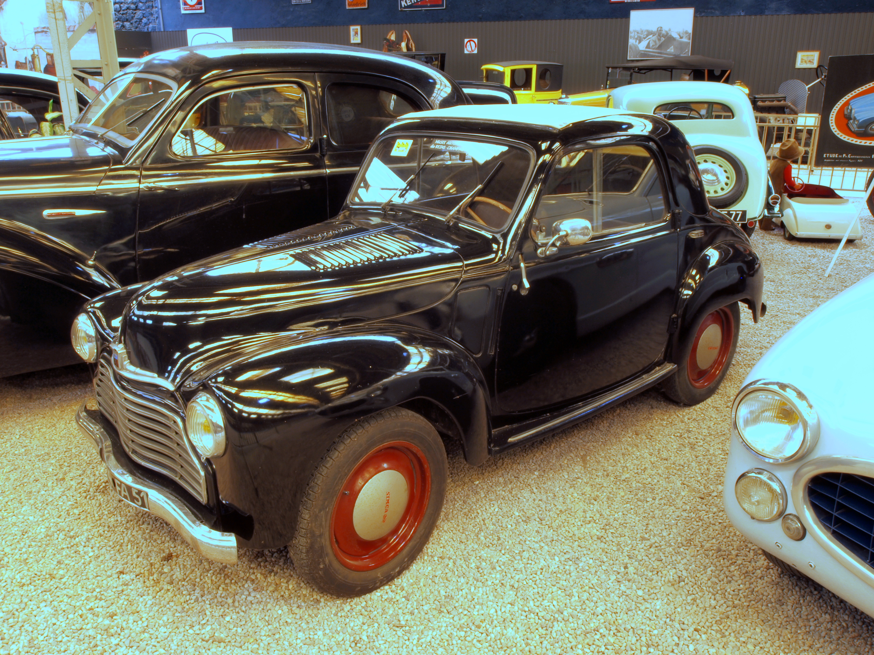 1948 Simca 6